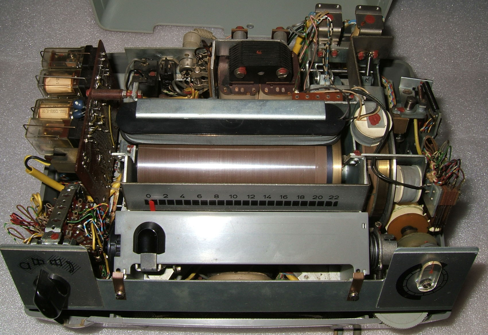 Intérieur d'un répondeur enregistreur téléphonique électromécanique à disque et tambour magnétique.